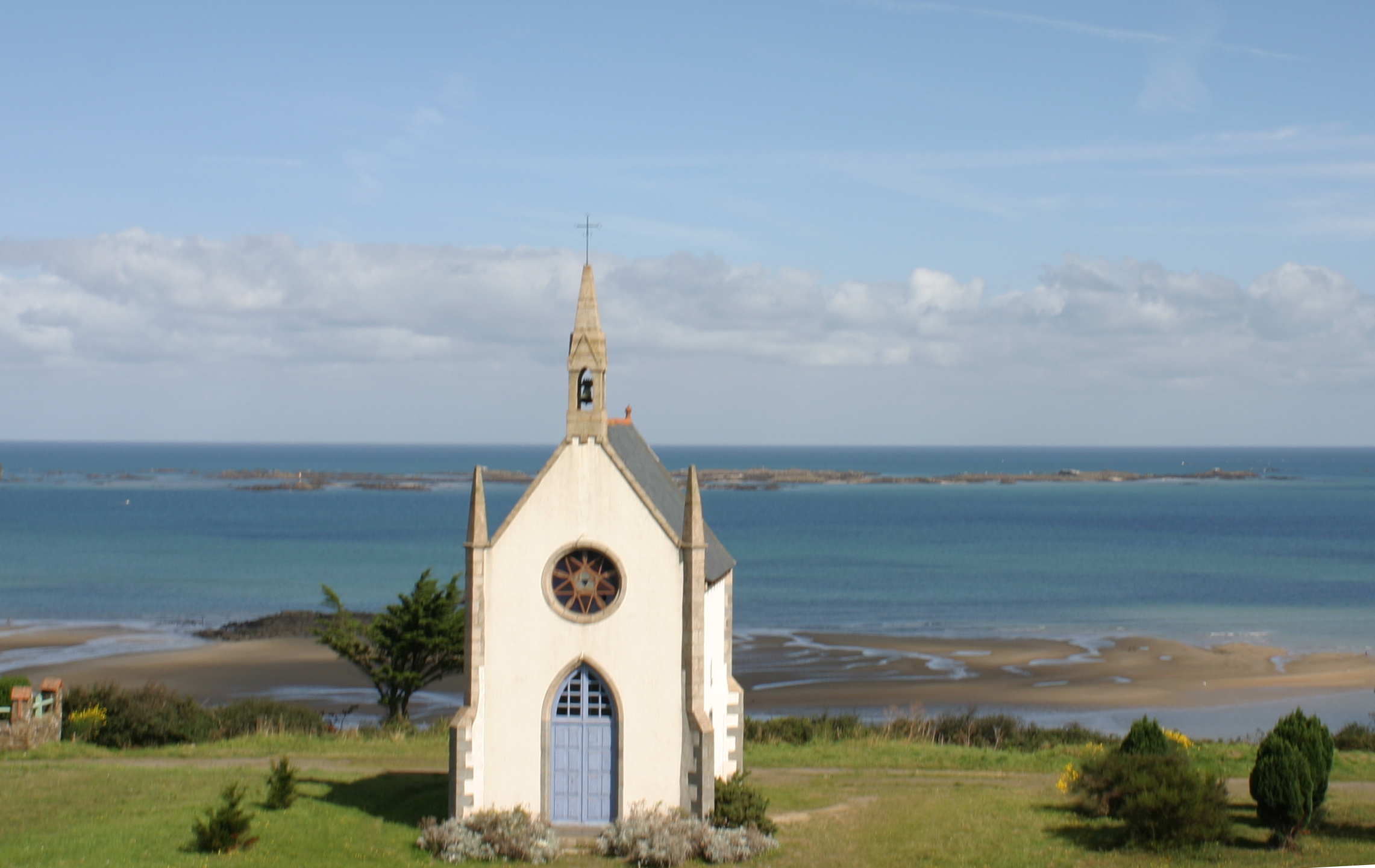 Etables sur mer chapelle notre dame esperance